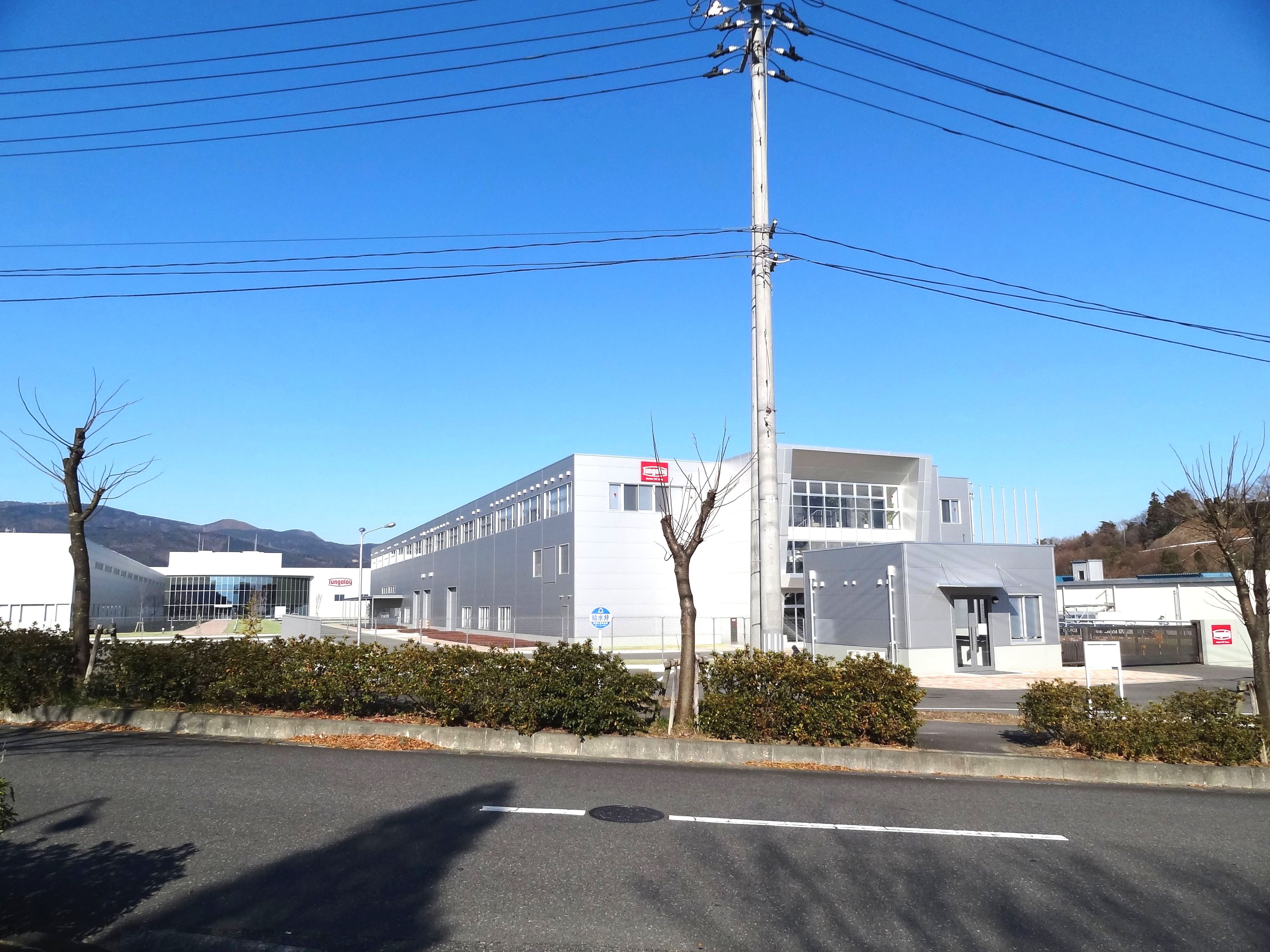 タンガロイ本社